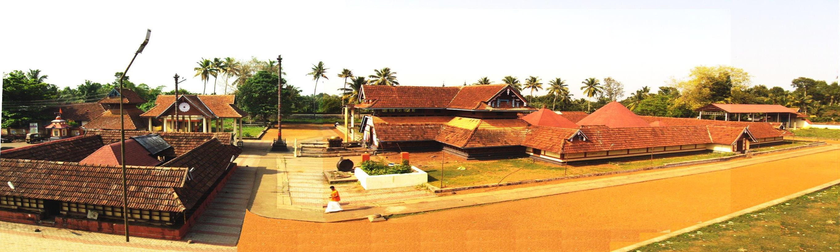 വാഴപ്പള്ളി മഹാക്ഷേത്രം